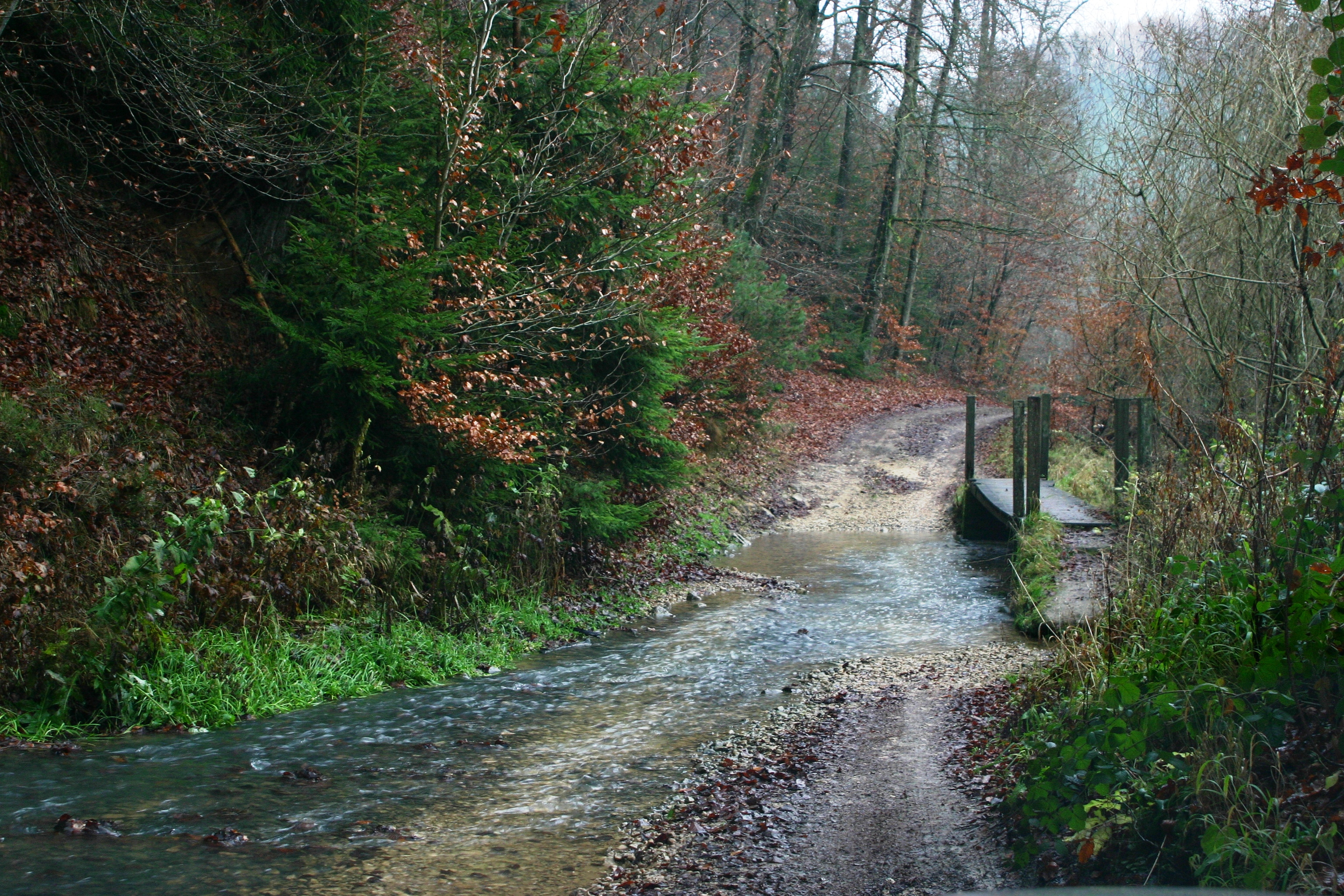 D'Millebaach an der Furt bei der Gäicheler Millen.